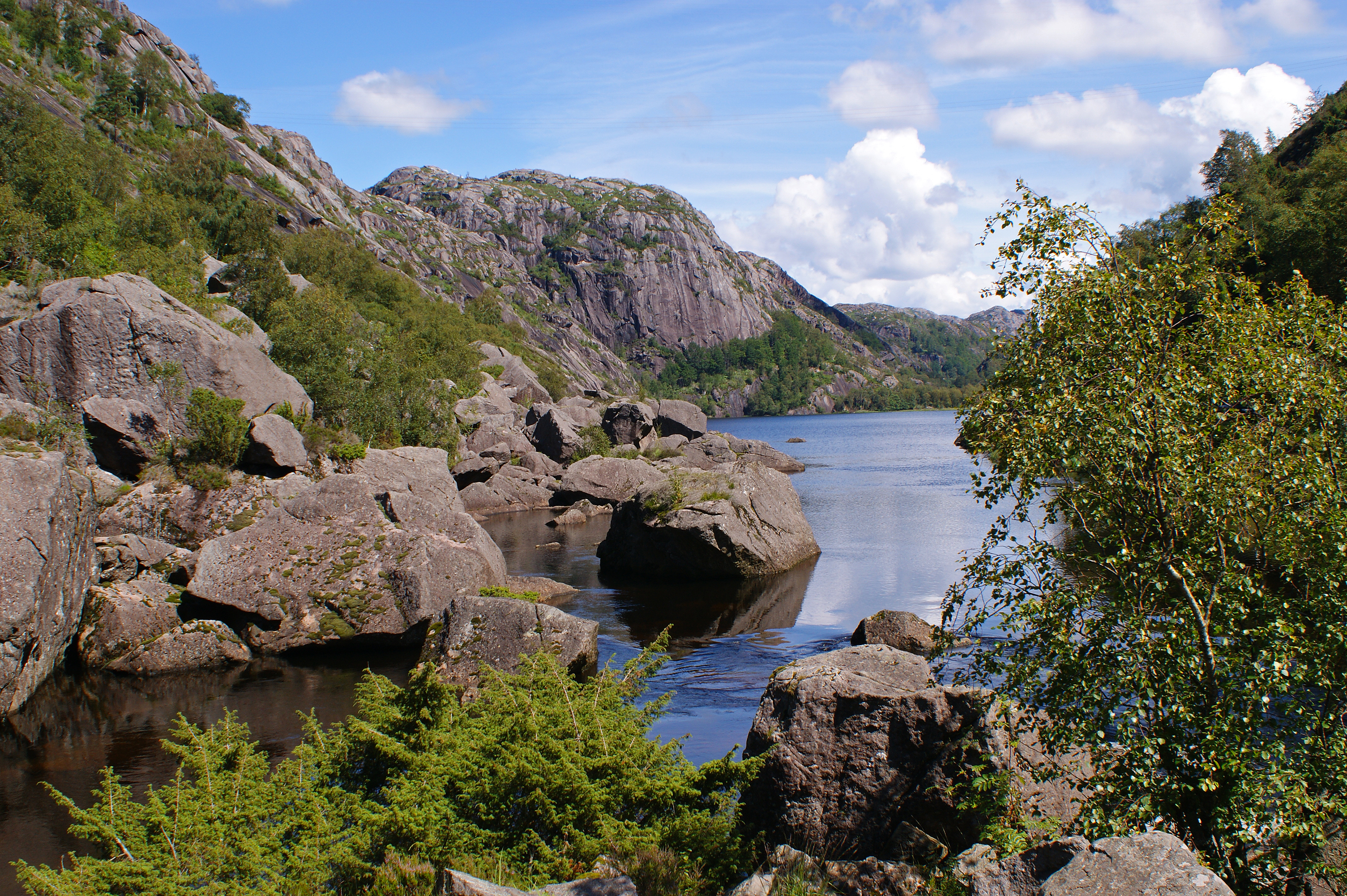 From Hauge i Dalane, Rogaland